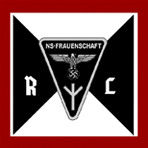 Reichsfrauenführerin (Kfz.-Stander)